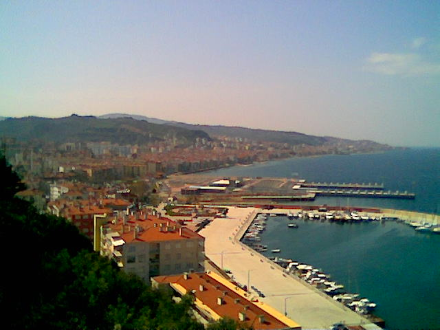 Güzelyalı-Mudanya